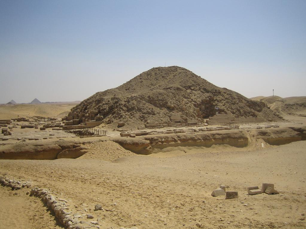 Nordseite der Unas-Pyramide in Sakkara, Ägypten